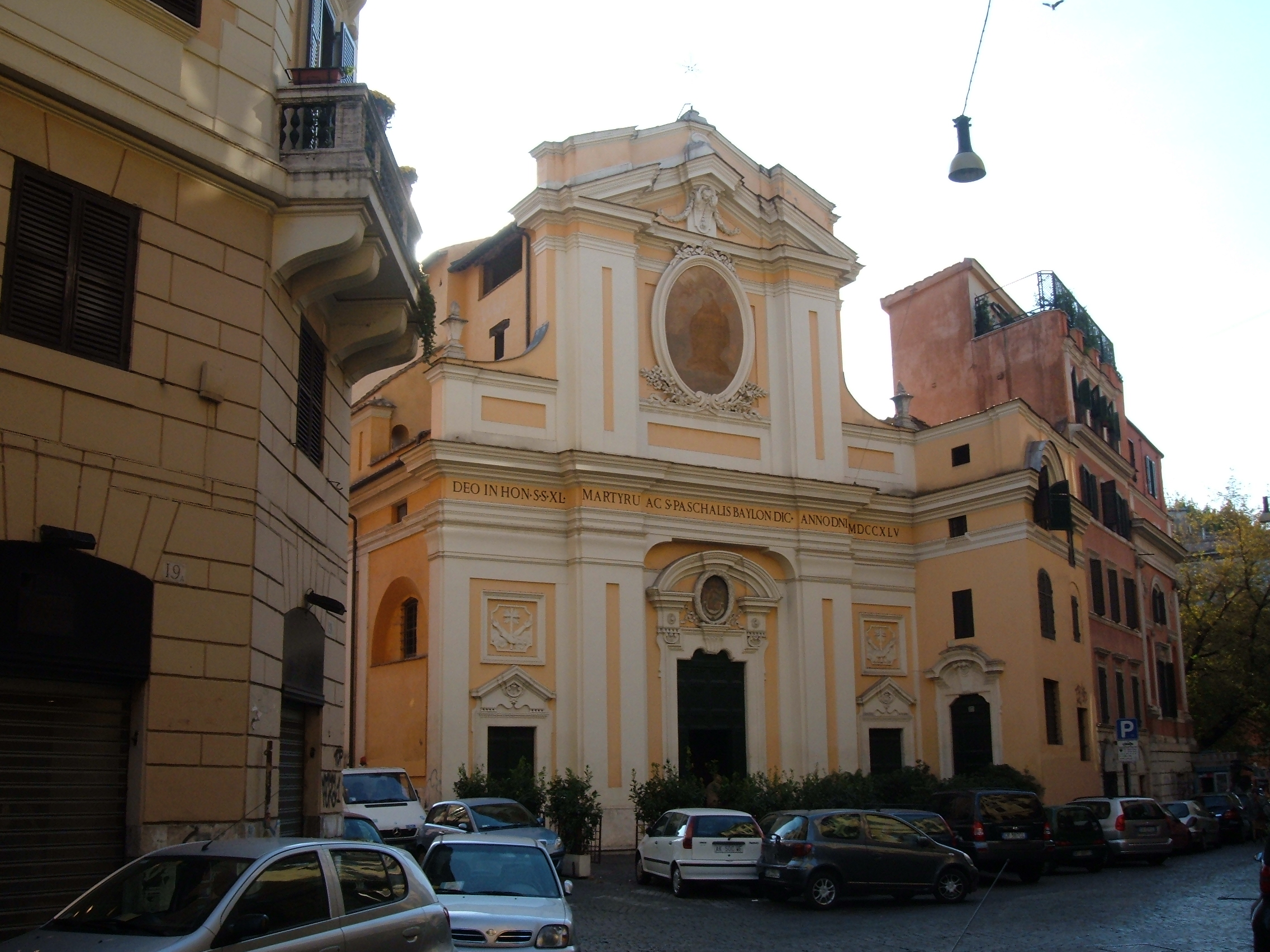 Chiesa dei Santa Quaranta Martiri e di San Pasquale Baylon, a Roma, nel rione Trastevere.